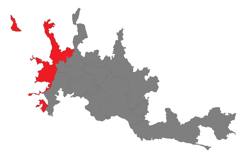 mapa de la ubicacion de la comuna atardeceres en el perimetro urbano